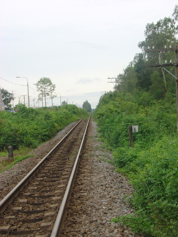 Hình này được chụp bởi tôi, người truyền hình lên, và tự nguyện trao cho cộng đồng dưới giấy phép: Thể loại:Đường sắt Việt Nam